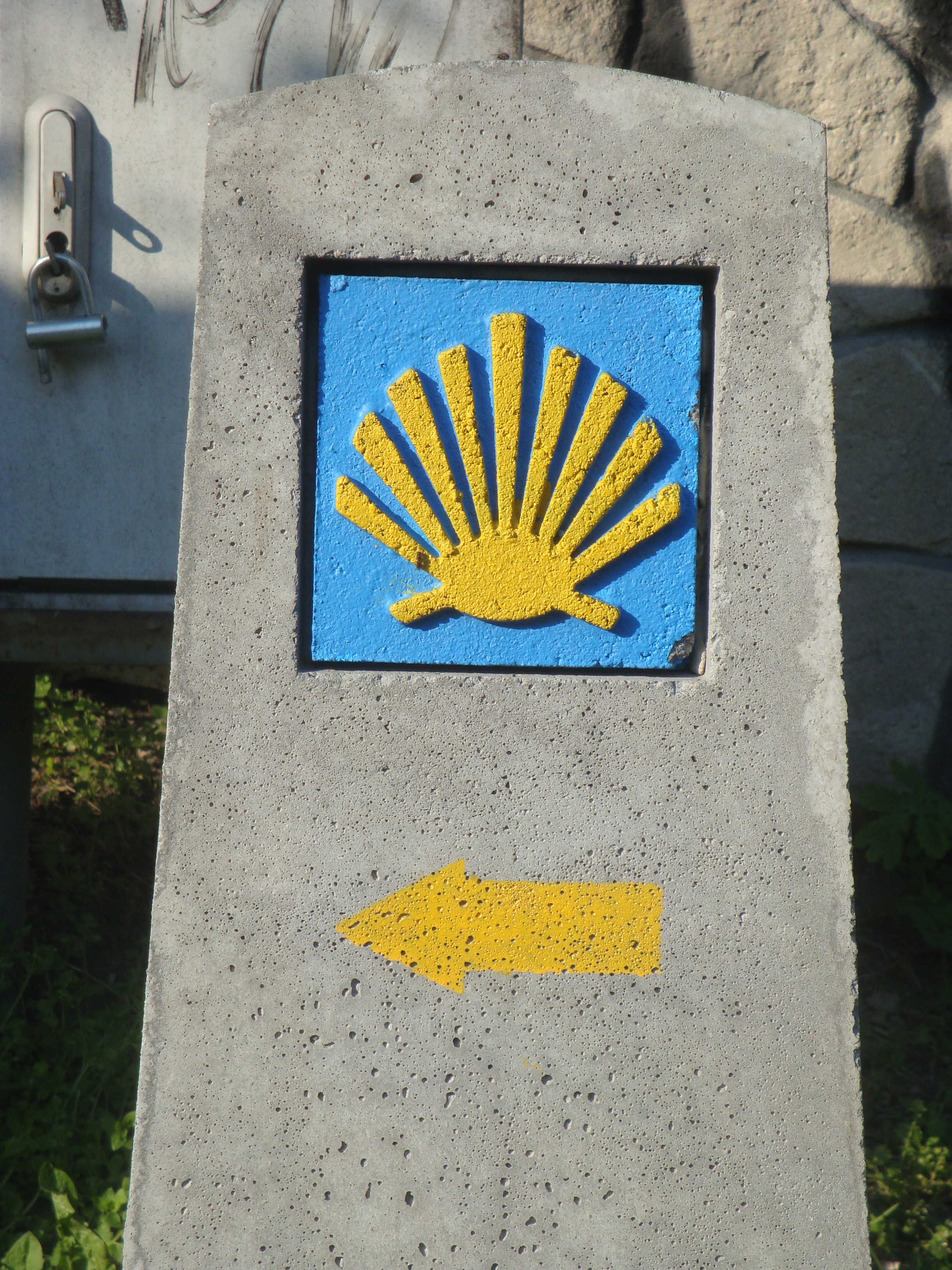 Oznaczenie Małopolskiego Szlaku św. Jakuba w Sandomierzu